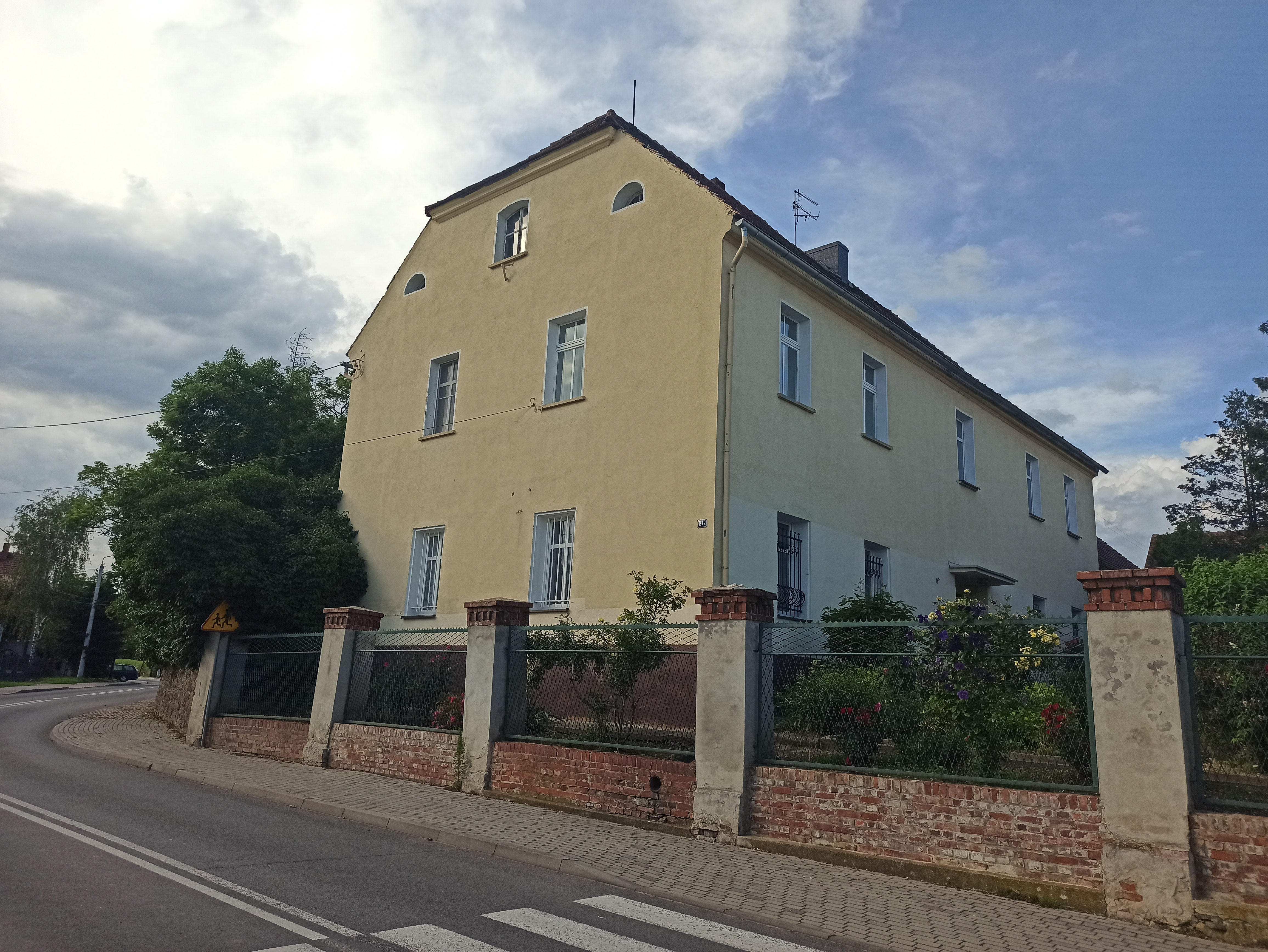 Dytmarów, dom nr 21a, 1. poł. XIX w. – plebania. 11.1958.